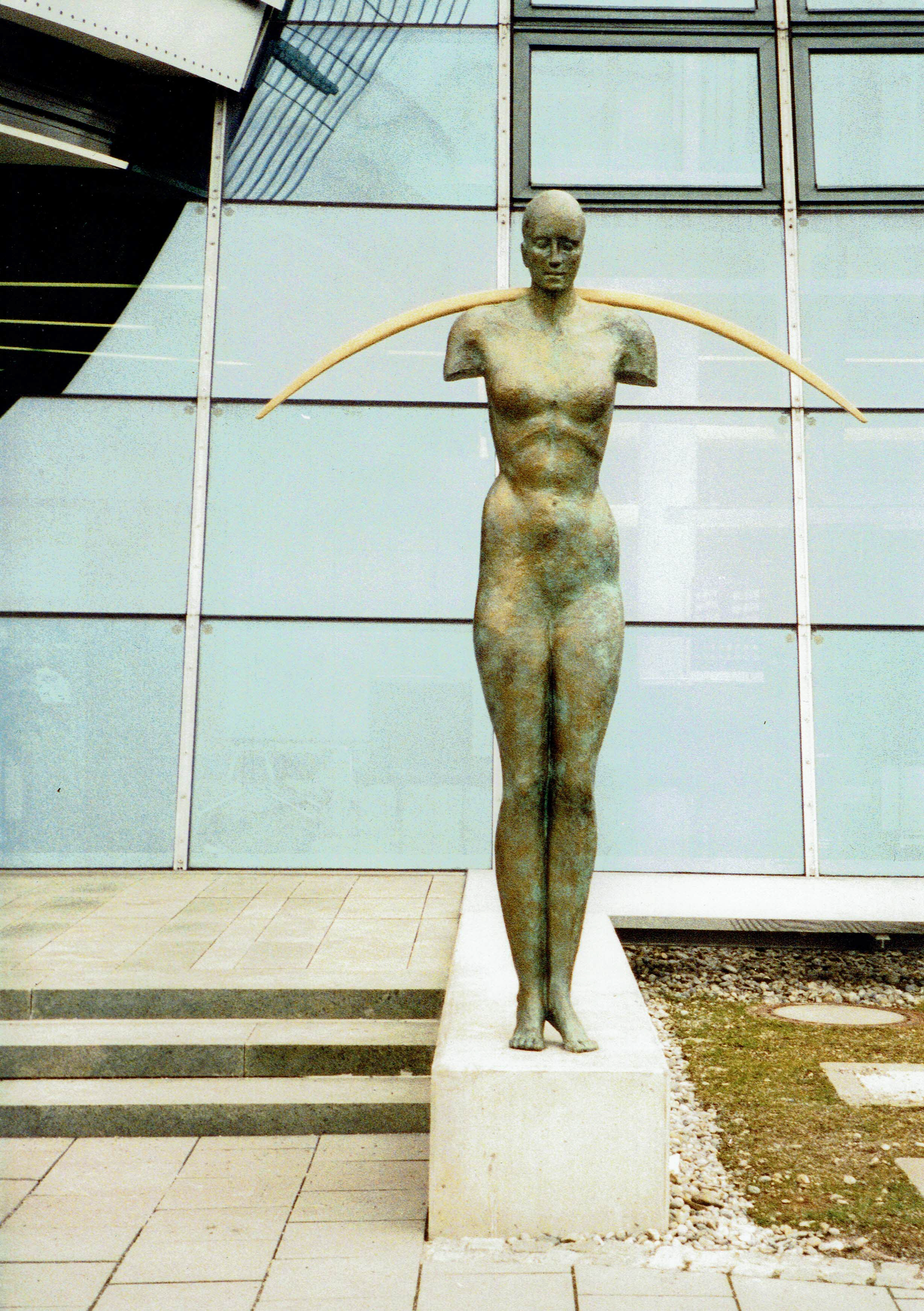 Skulptur Balance Ulla M. Scholl 2000